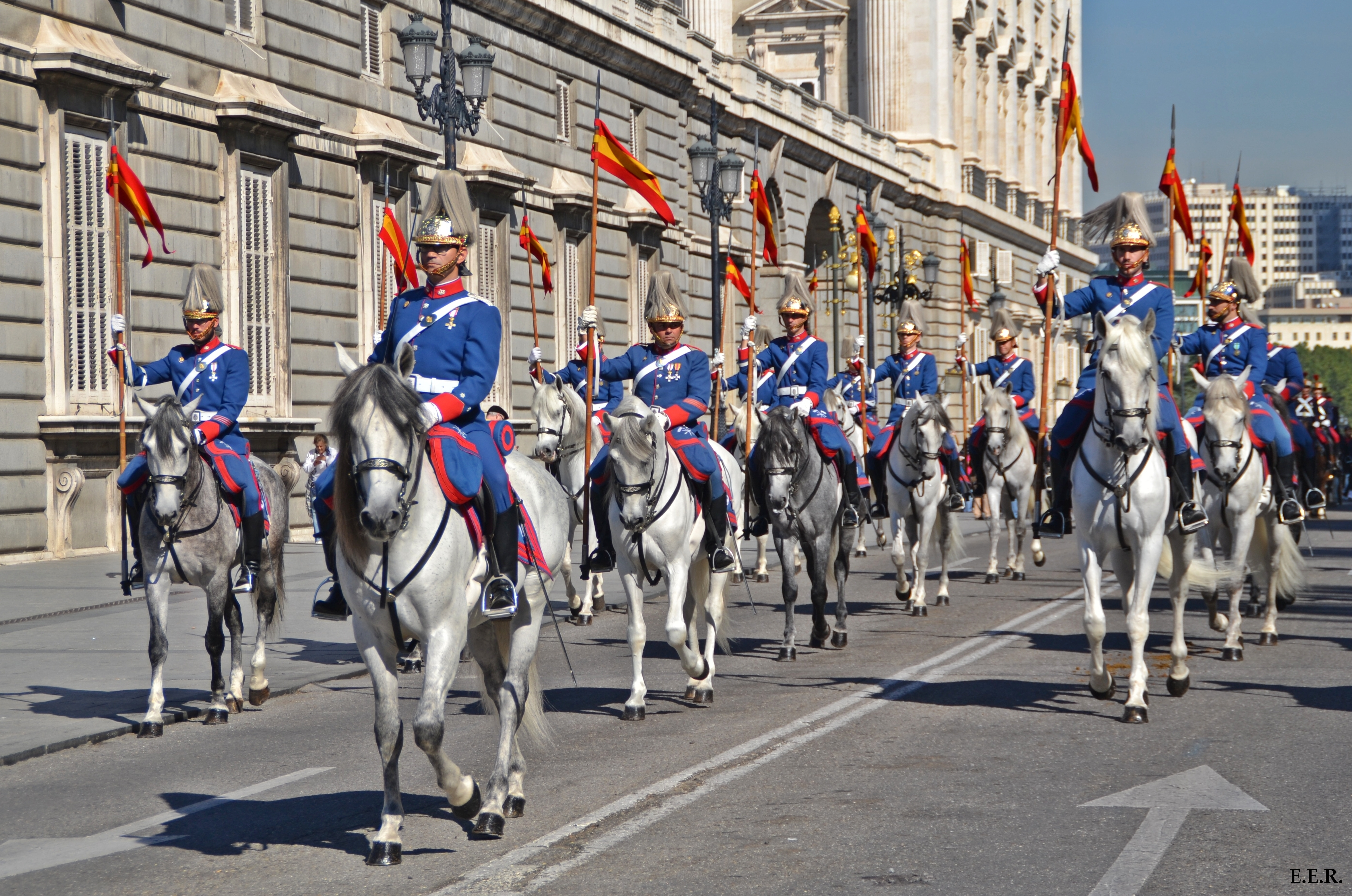 Lanceros del Escuadrón de Escolta Real